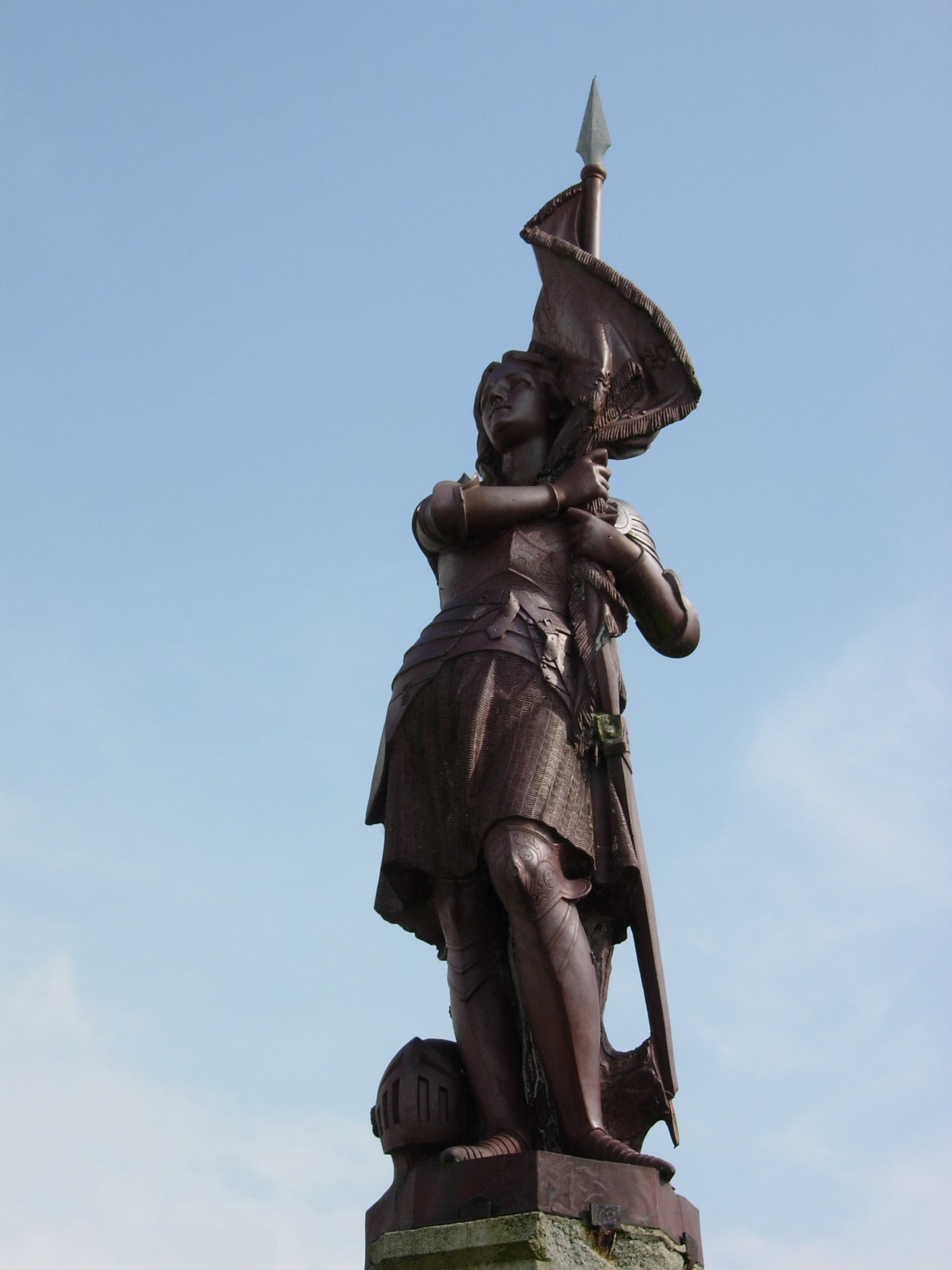 Monument aux morts de 1870